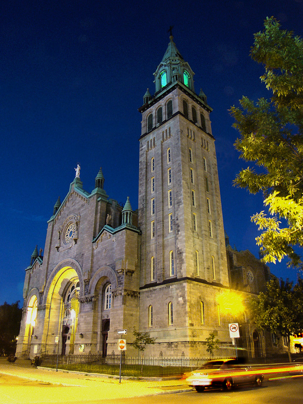 Église Nativité-de-la-Sainte-Vierge-d’Hochelaga, Montréal, Québec, Canada.